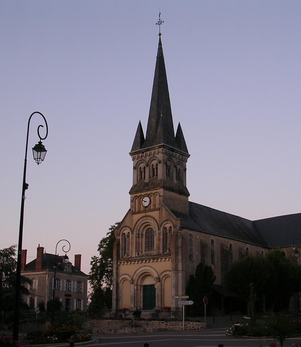 Bourg de Saint-Cénéré